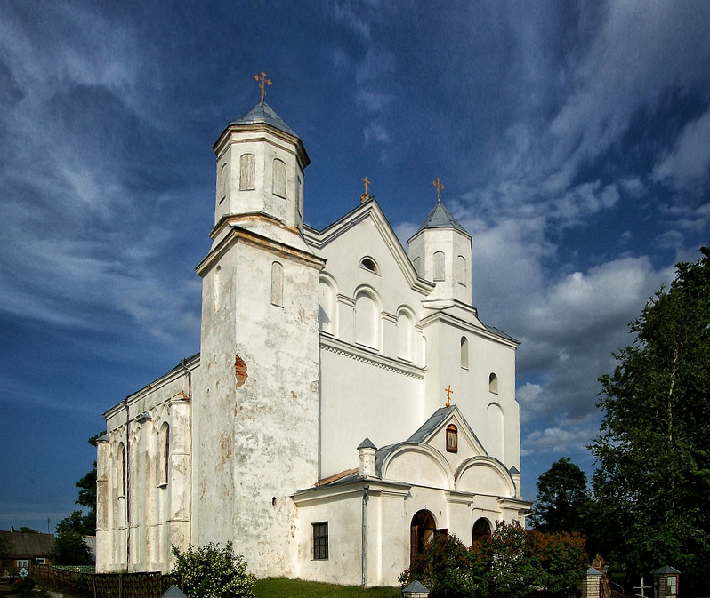 Беларуская (тарашкевіца): Комплекс Барысаглебскага кляштару:Барысаглебская царквагалоўны алтарманастырскі корпус. Наваградак This is a photo of Belarusian heritage monument. Reference number: 411Г000436 ( WLM)